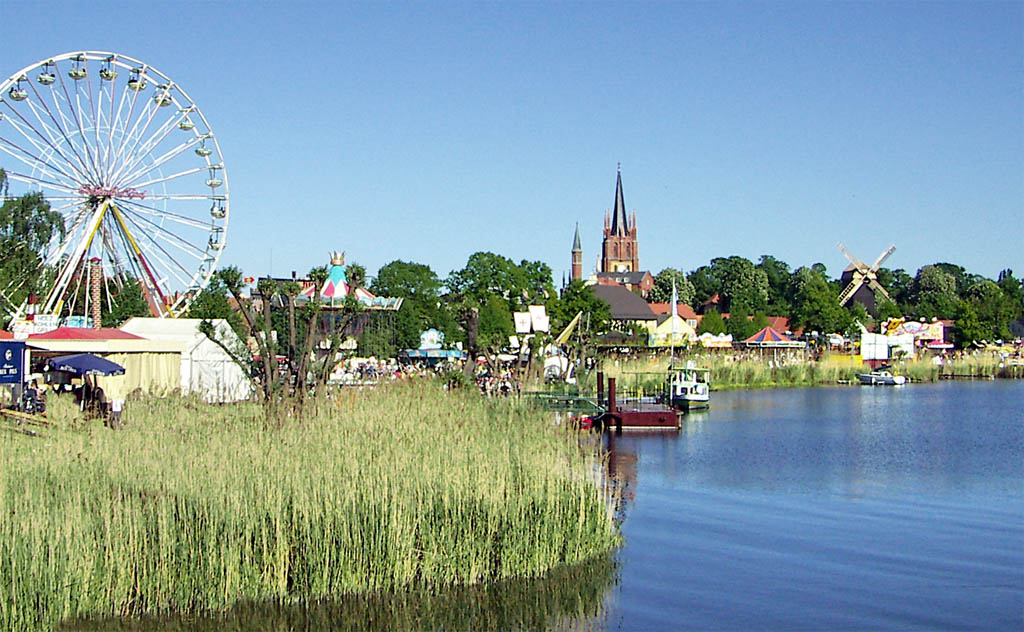 Das Baumblütenfest in Werder (Havel), Brandenburg im Sommer 2005. (Werder at Havel in Germany)